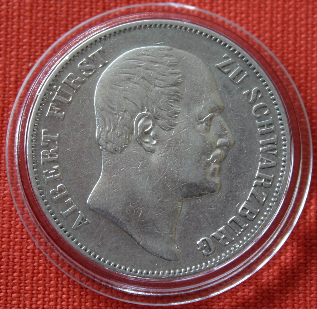 Vereinstaler 1867 Albert von Schwarzhausen